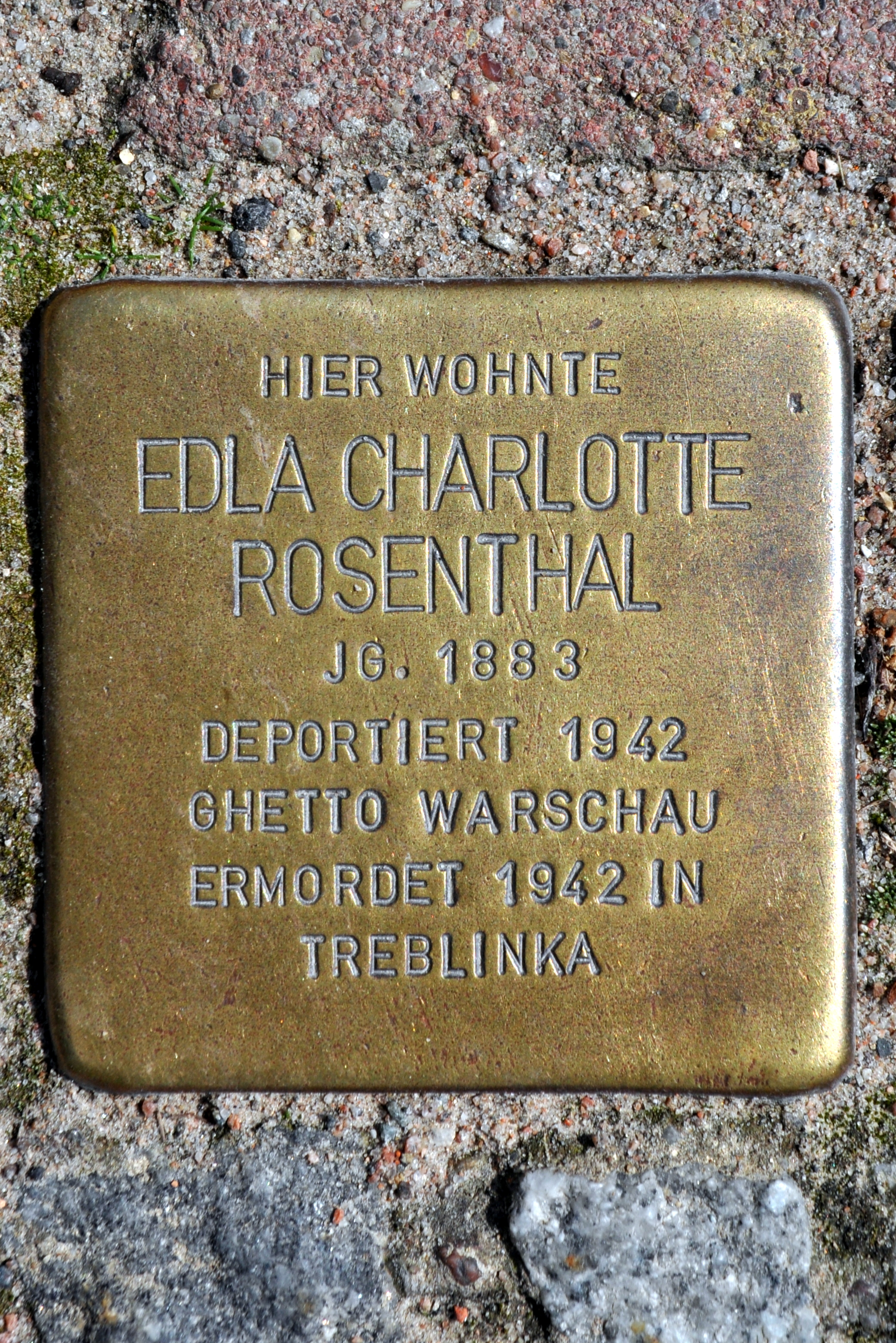 Stolperstein in Ahrenshoop, Ortsteil Althagen, fü Edla Chrlotte Rosenthal.